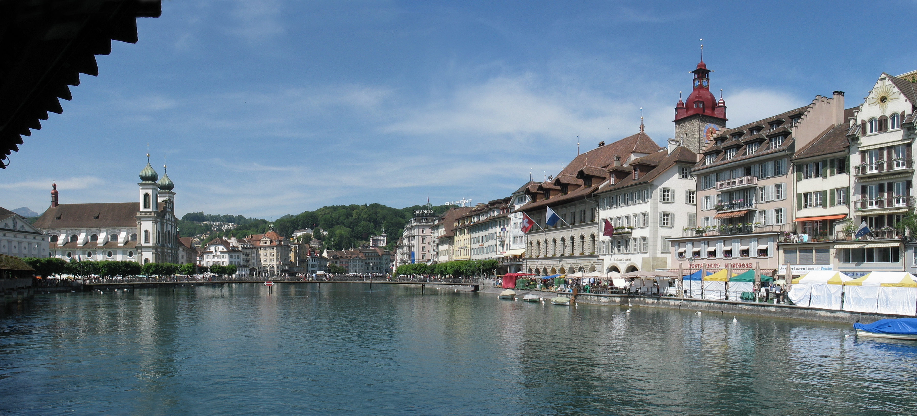 Luzern/Zentralschweiz - Blick von der Kapellbrücke auf die Reuss; rechts das Rathaus und links die Jesuitenkirche